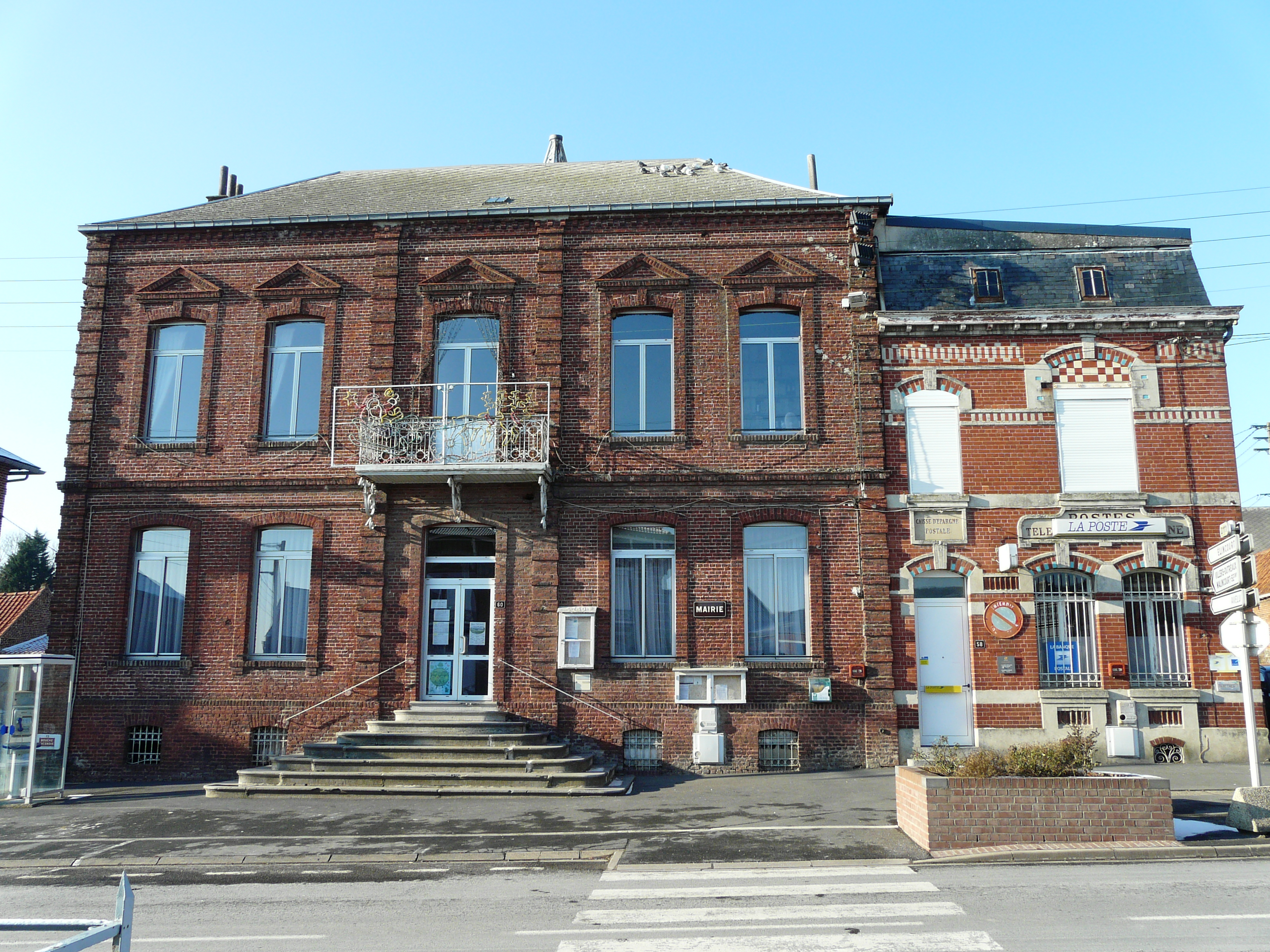 La mairie et la poste de Maretz (Nord)